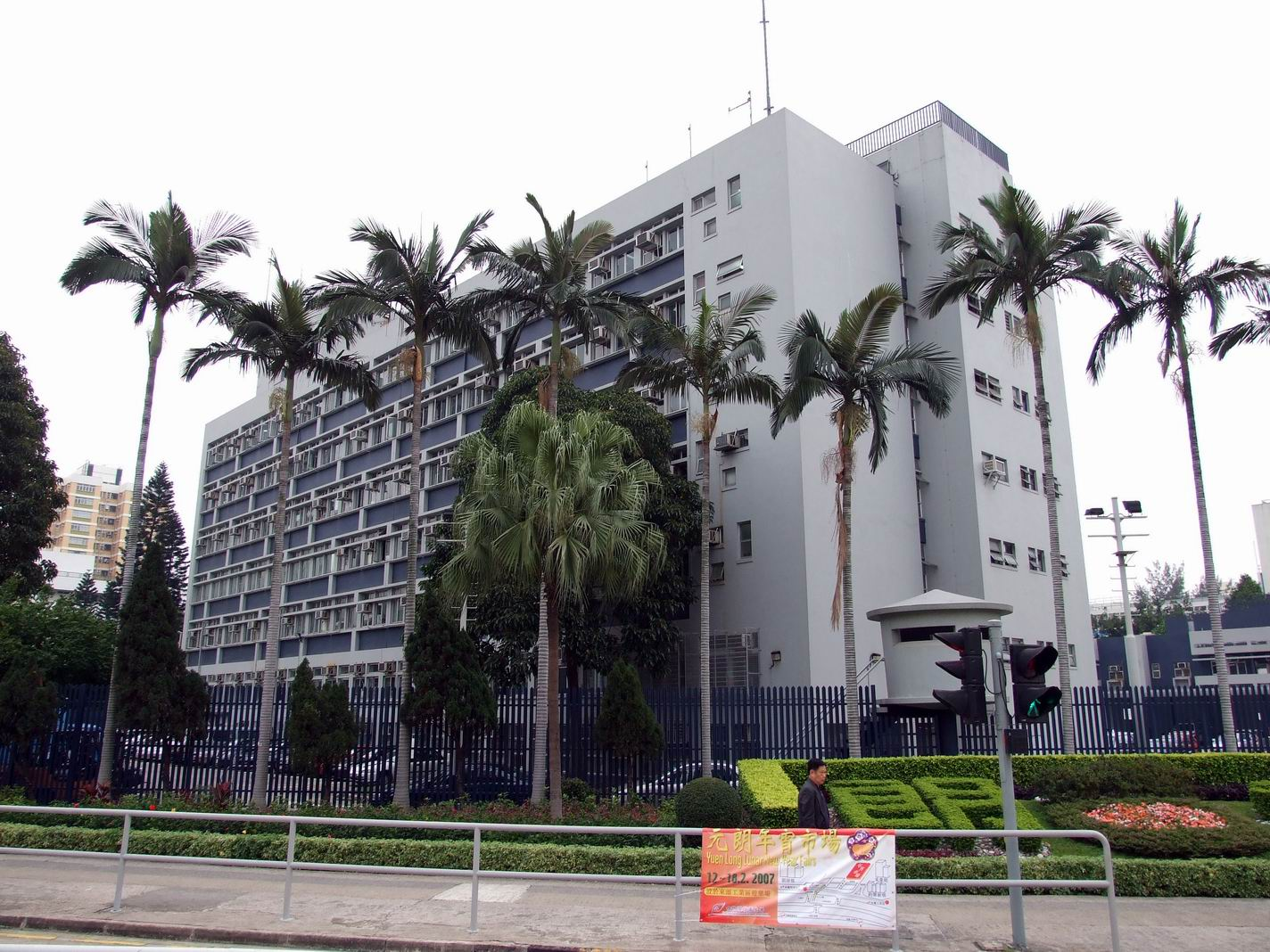 元朗分區警署